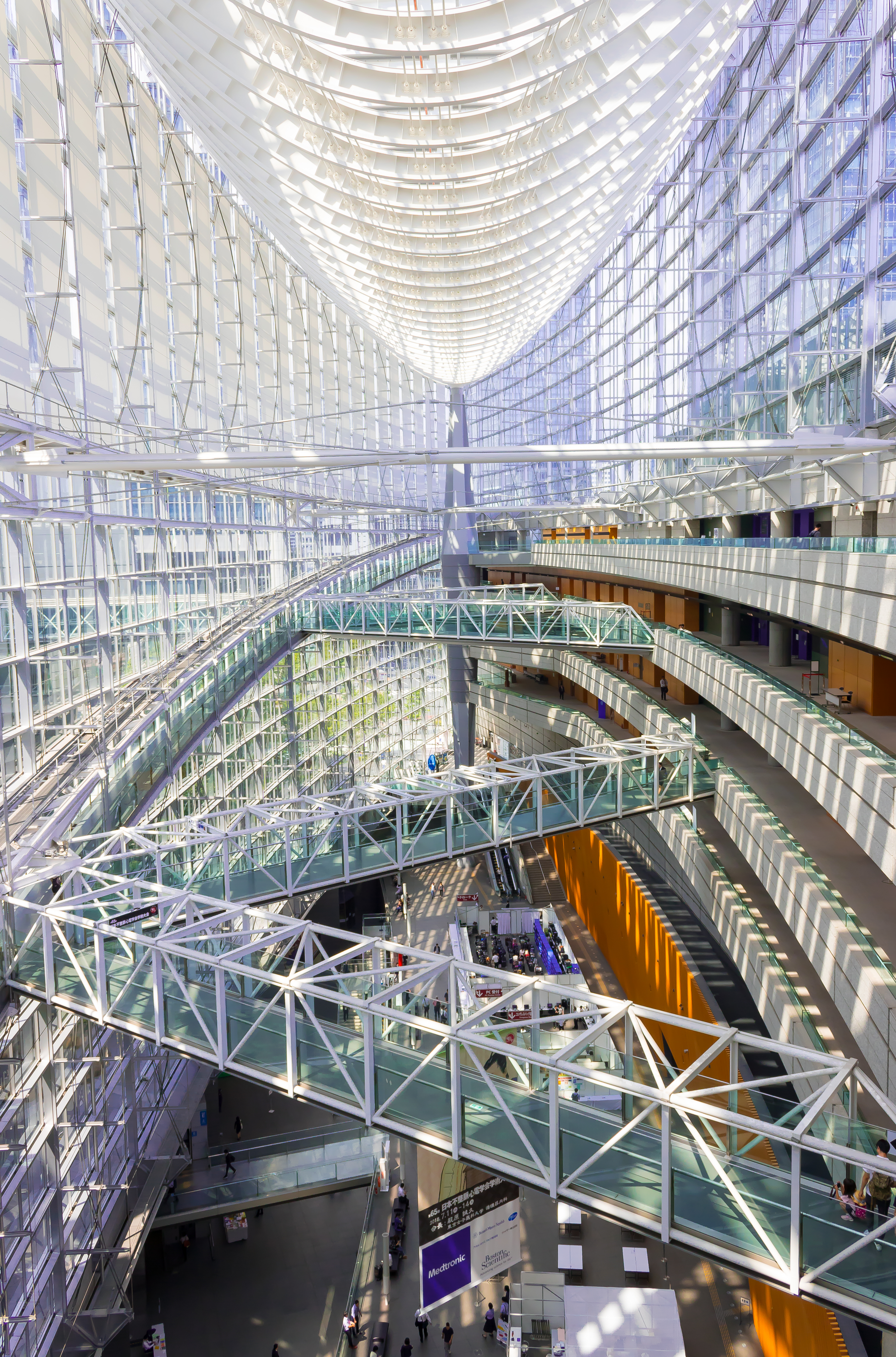 東京国際フォーラム。設計：ラファエル・ヴィニオリ（Rafael Viñoly）